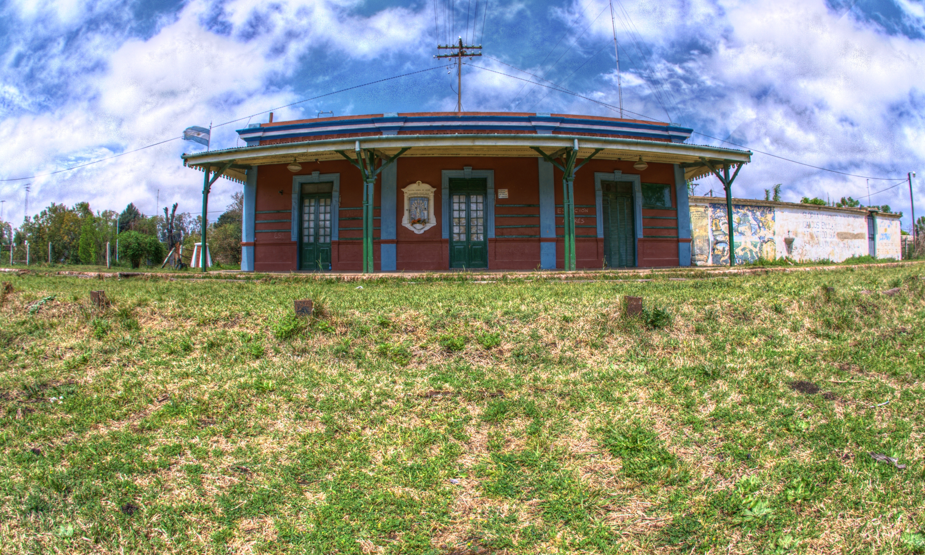 Estación de San Andrés de Giles, provincia de Buenos Aires, Argentina.